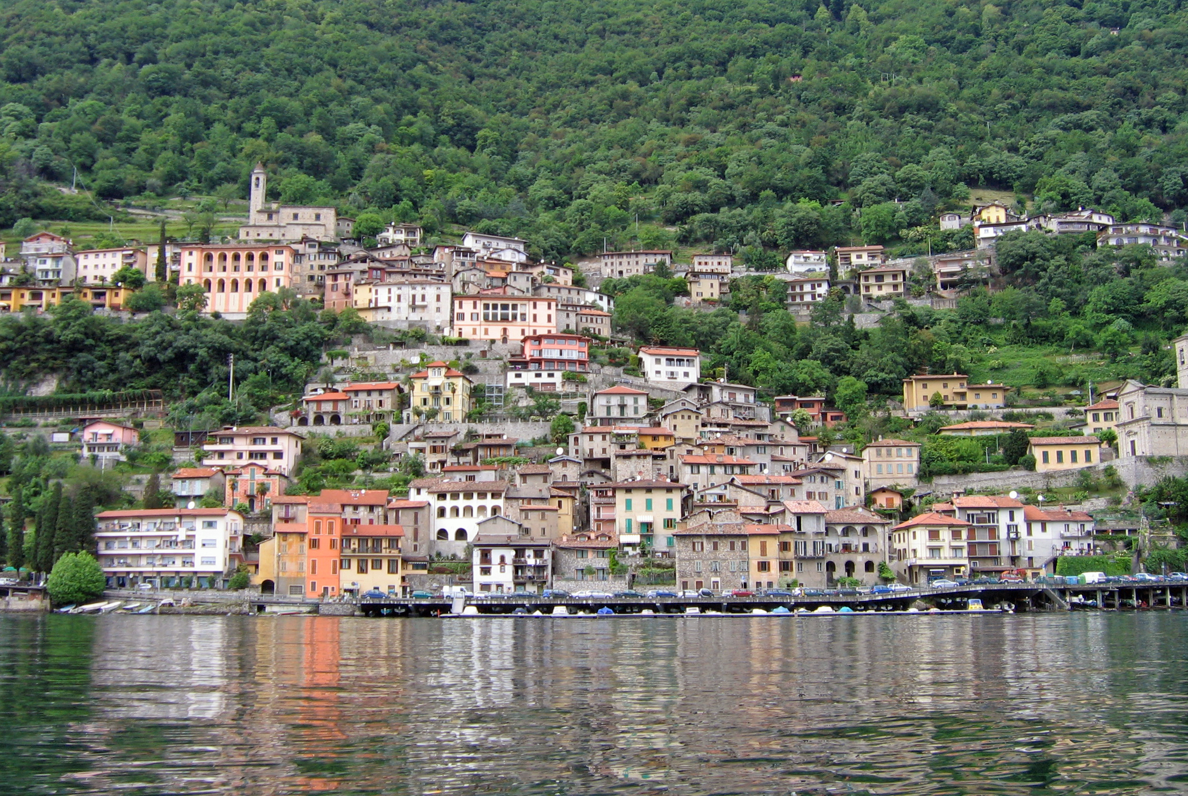 Cima